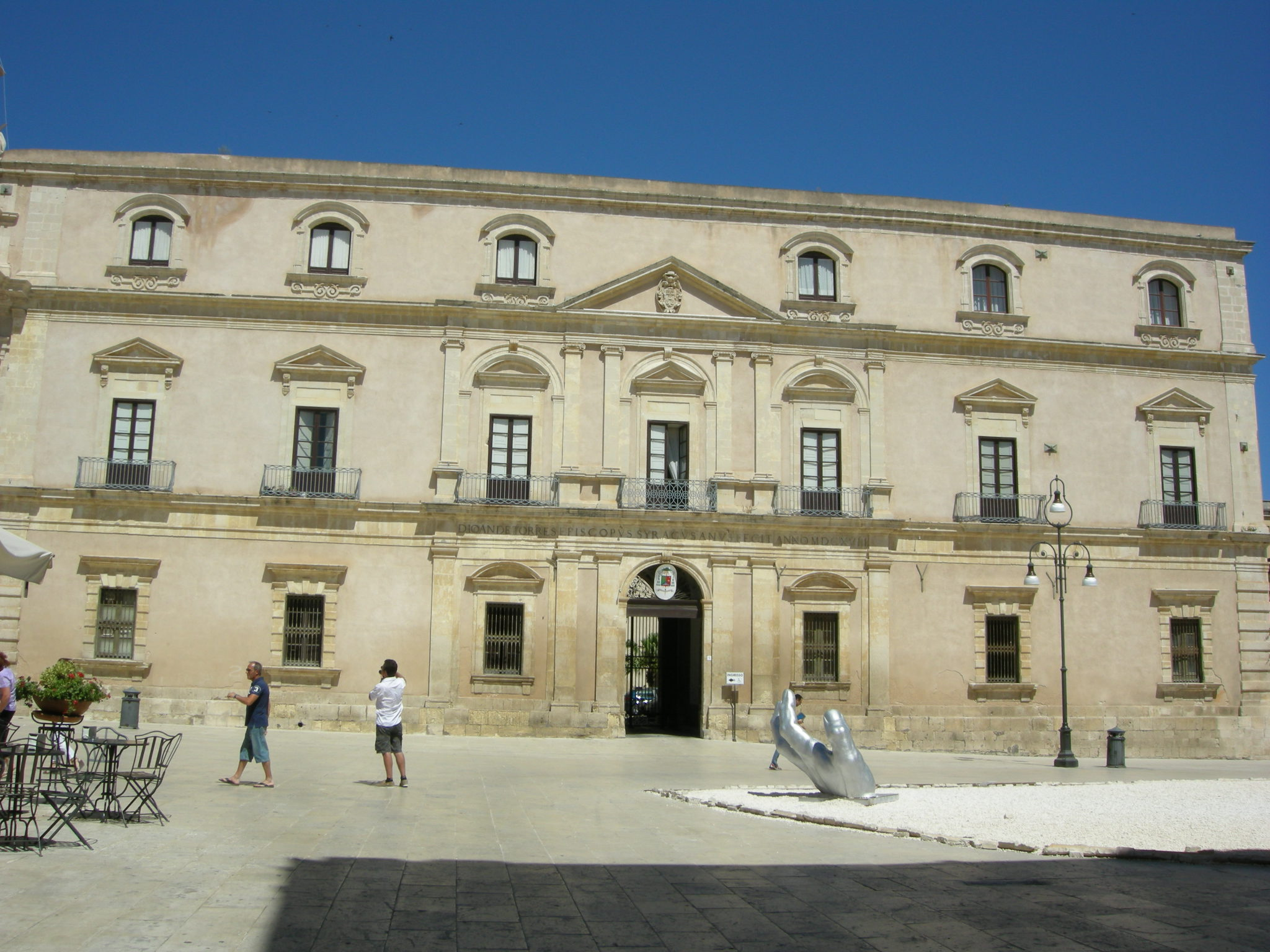 Ortigia, palazzo arcivescovile